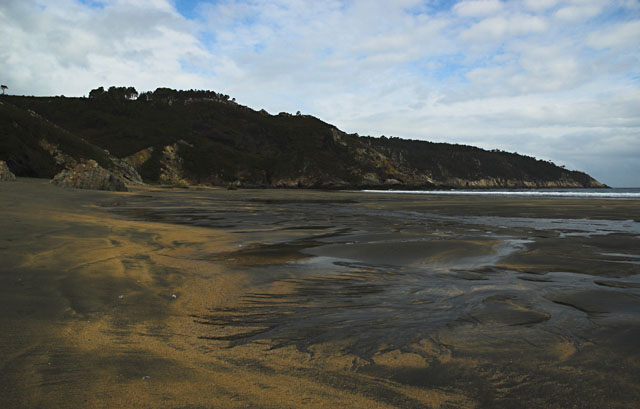 Playa de Otur, Asturias